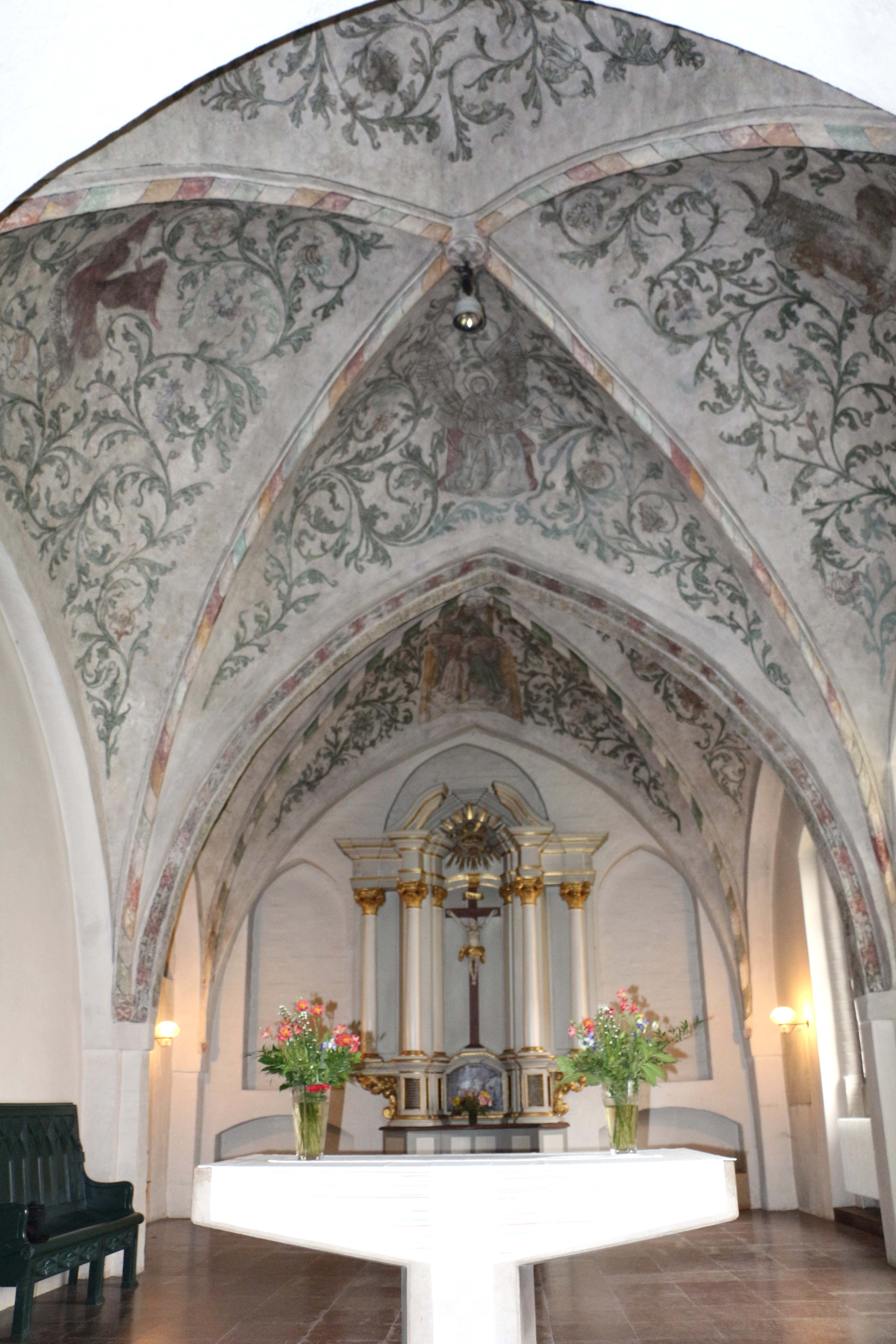 Chor der St. Johanneskirche in Flensburg